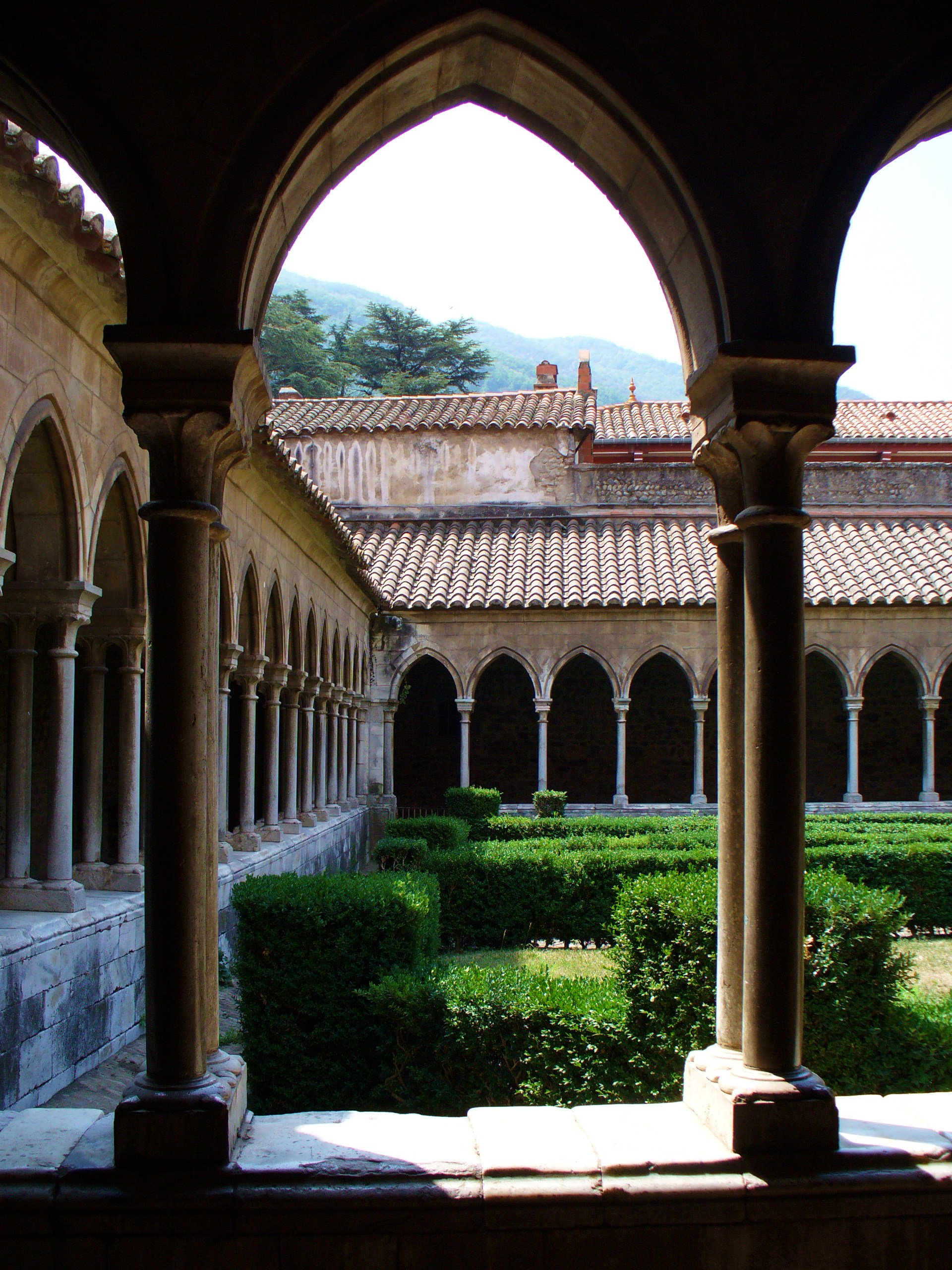 Die Arkaden des Kreuzgangs von Sainte-Marie in Arles-sur-Tech